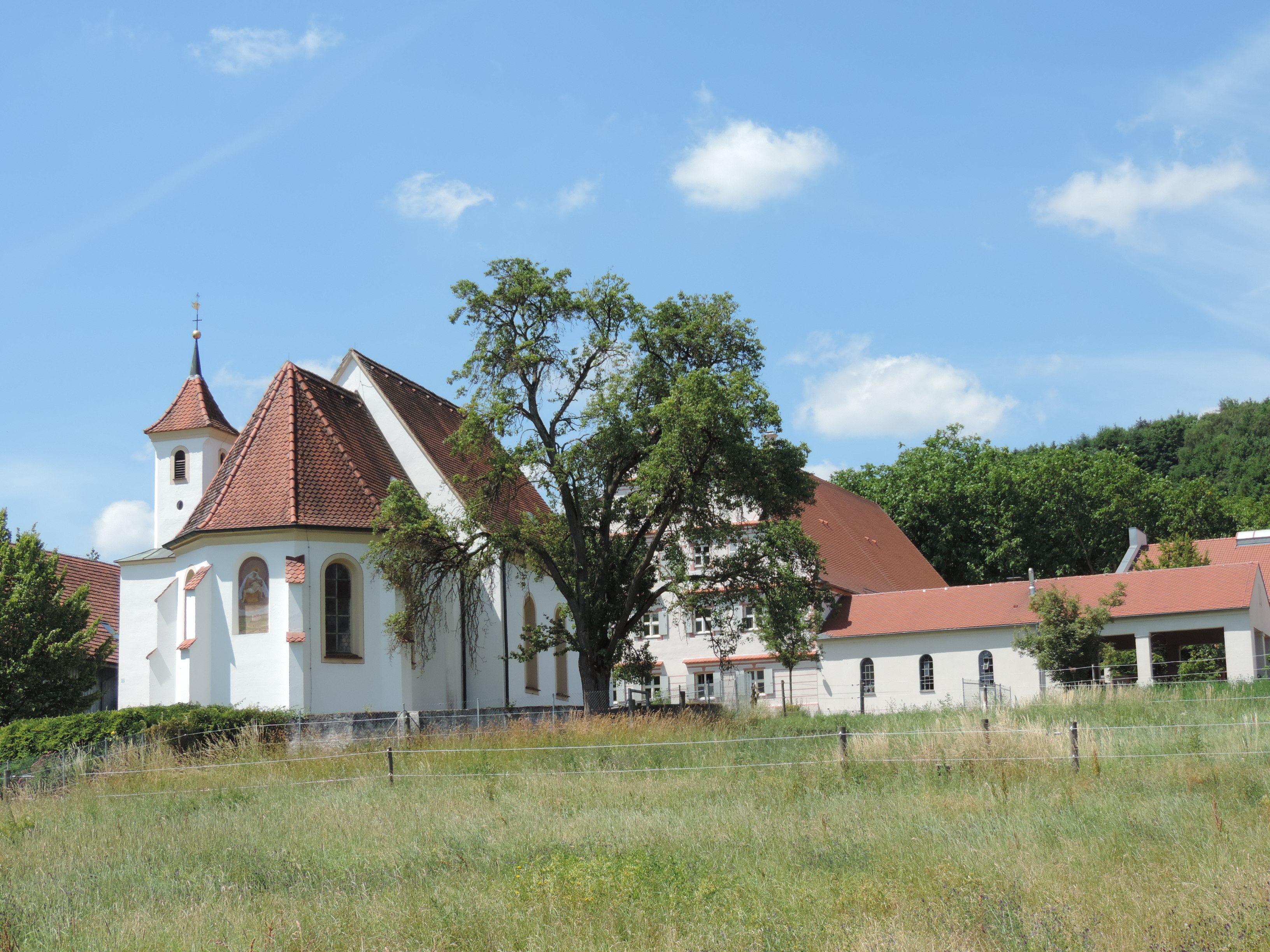 Gesamtansicht des Guts von Osten